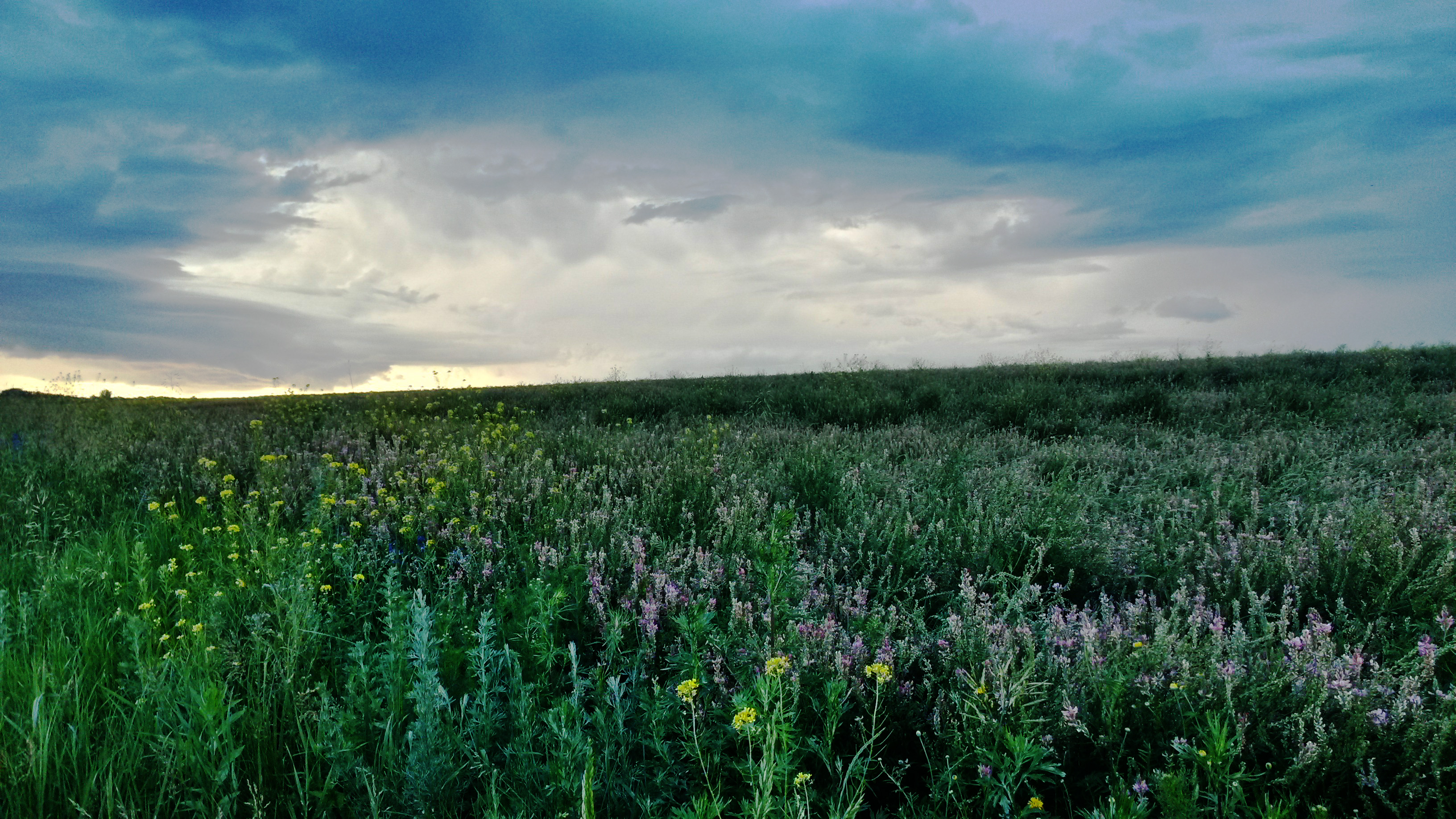 Центрально-Черноземный им.проф.В.В.Алёхина, Горшеченский район This image is related to the protected area of Russia number 4600019